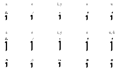 Tengwar, tehtar